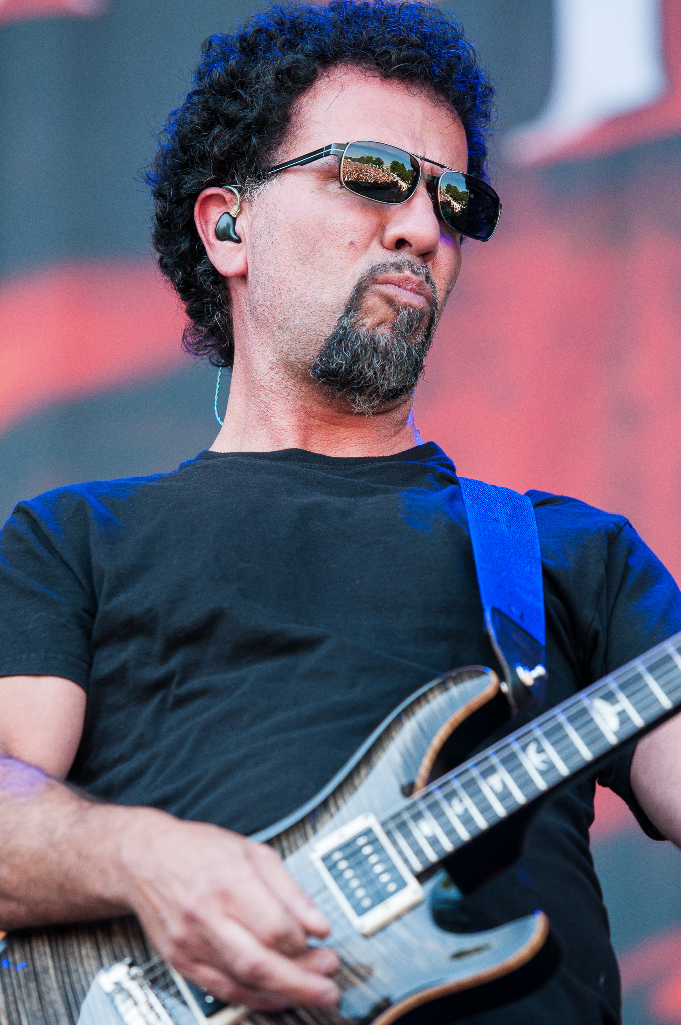 ARGO-Konzerte,Beck's Park Stage,Festival,Godsmack,Konzert,Livekonzert,Livemusik,Musik,RiP,Rock im Park 2015,Tony Rombola